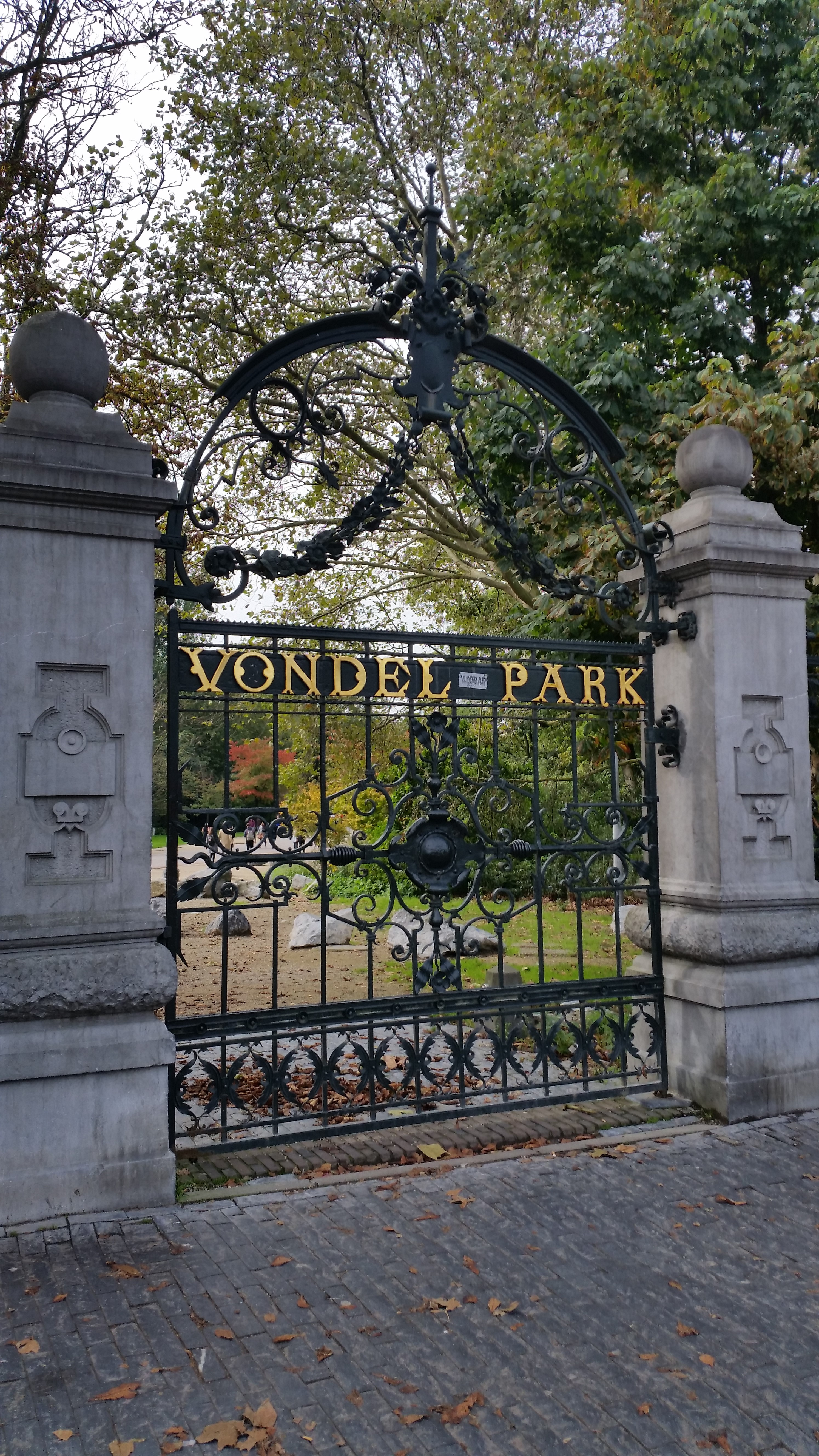 Toegangshek Vondelpark met boog